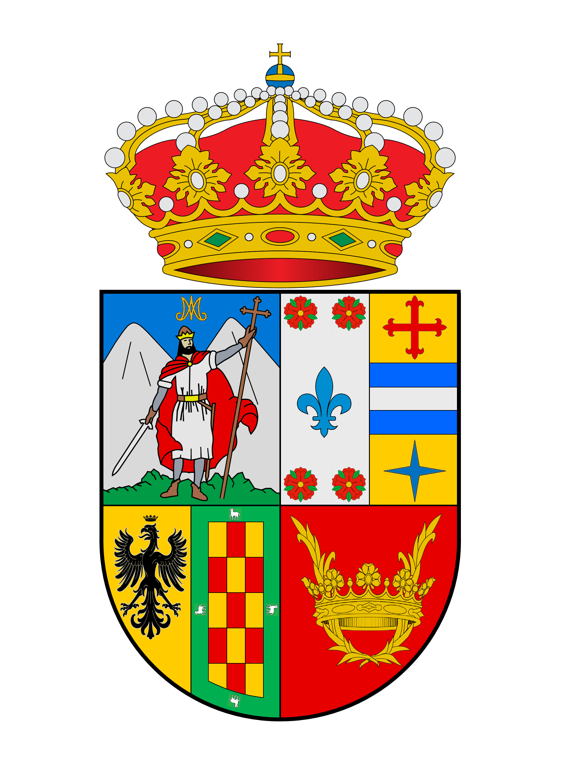 Escudo del municipio asturiano de Parres.